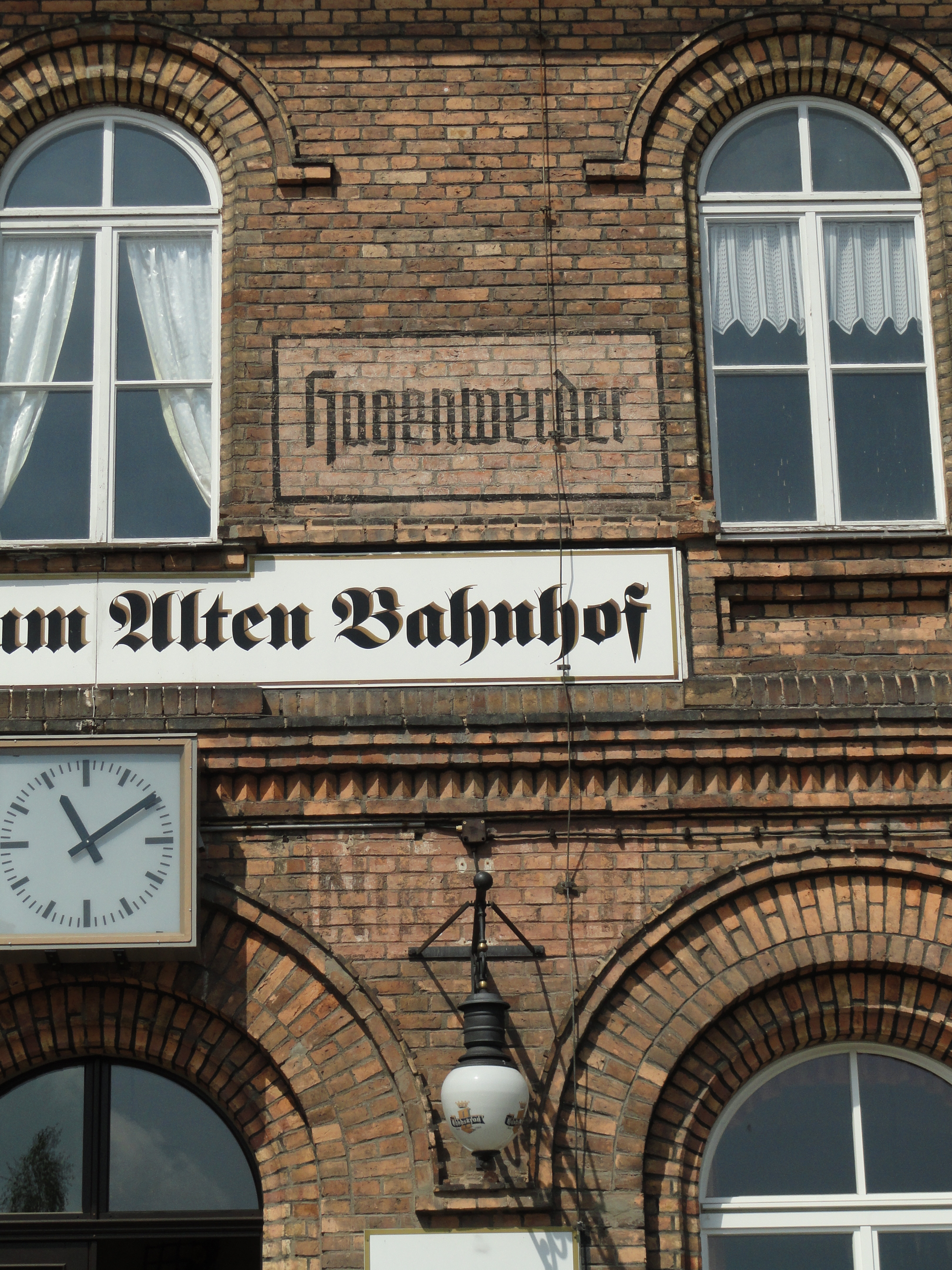 Alte Bahnhofsnamen an der Ostfassade des Bahnhofs Hagenwerder, oben Hagenwerder unten (hinter der Lampenhalterung) Nikrisch